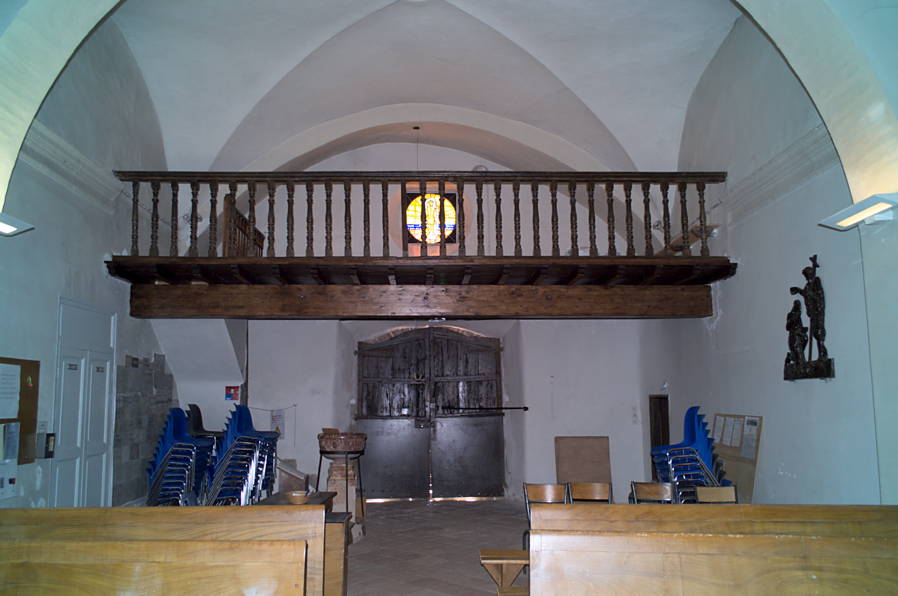 Entrée de la nef et balcon, ermitage Saint-Ferreol, Céret (Pyrénées-Orientales, Languedoc-Roussillon, France)